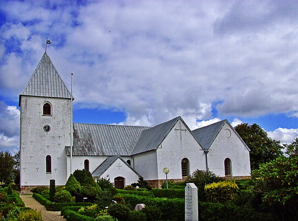 fra syd